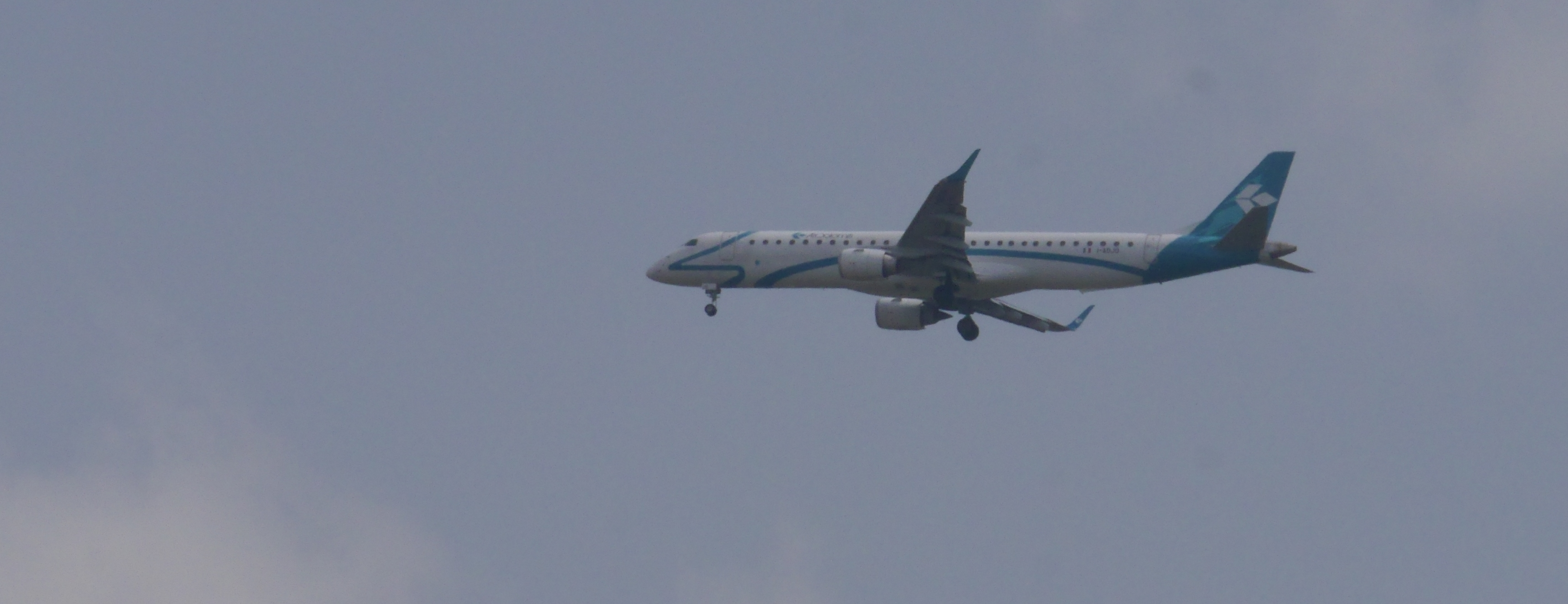 This photo was taken with Panasonic Lumix DMC-G6 camera, thanks to Panasonic.You can see all photographs in category: Taken with Panasonic Lumix DMC-G6.